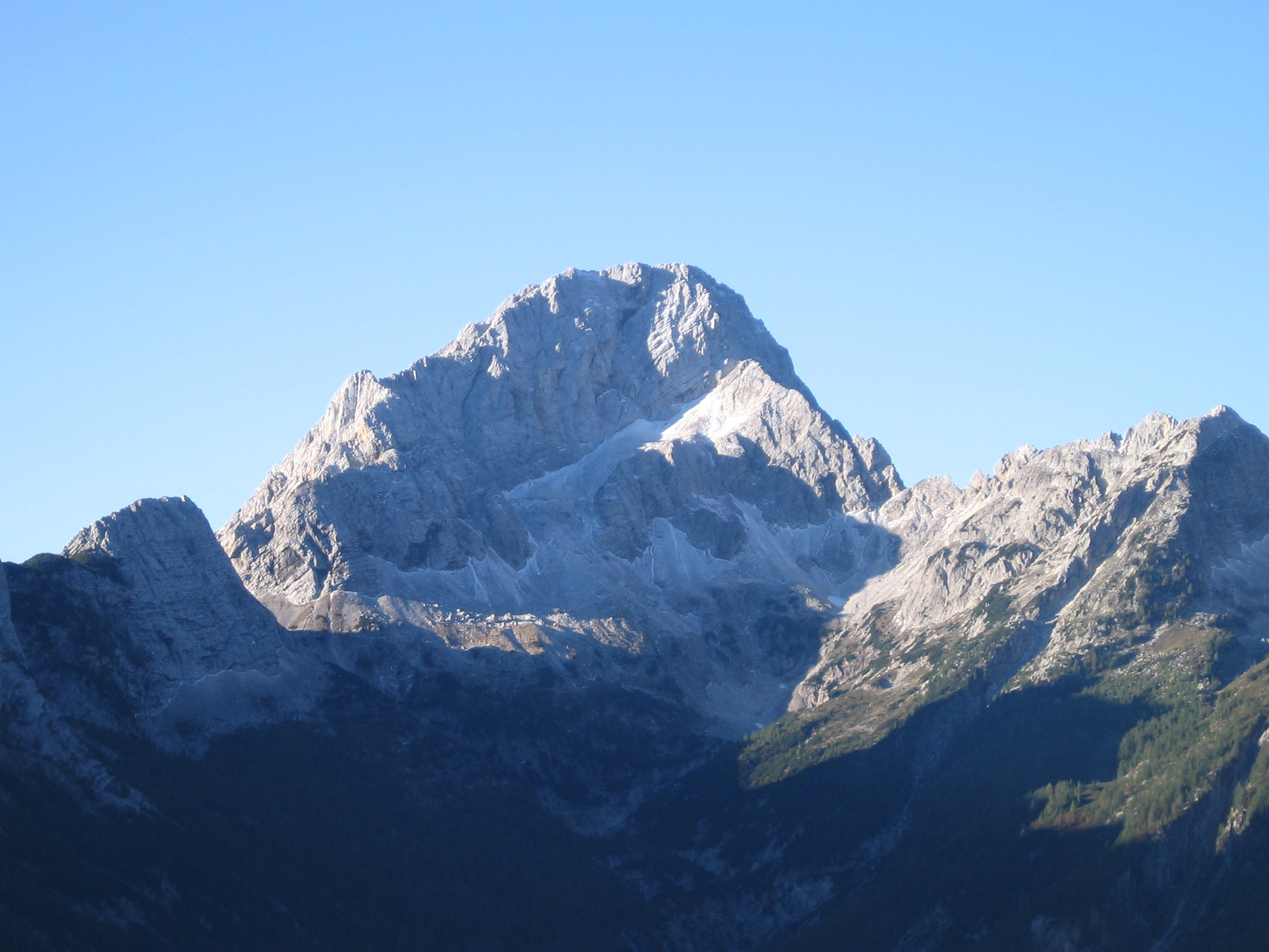 Mount Bavški Grintavec above Zadnja Trenta Valley, Julian Alps